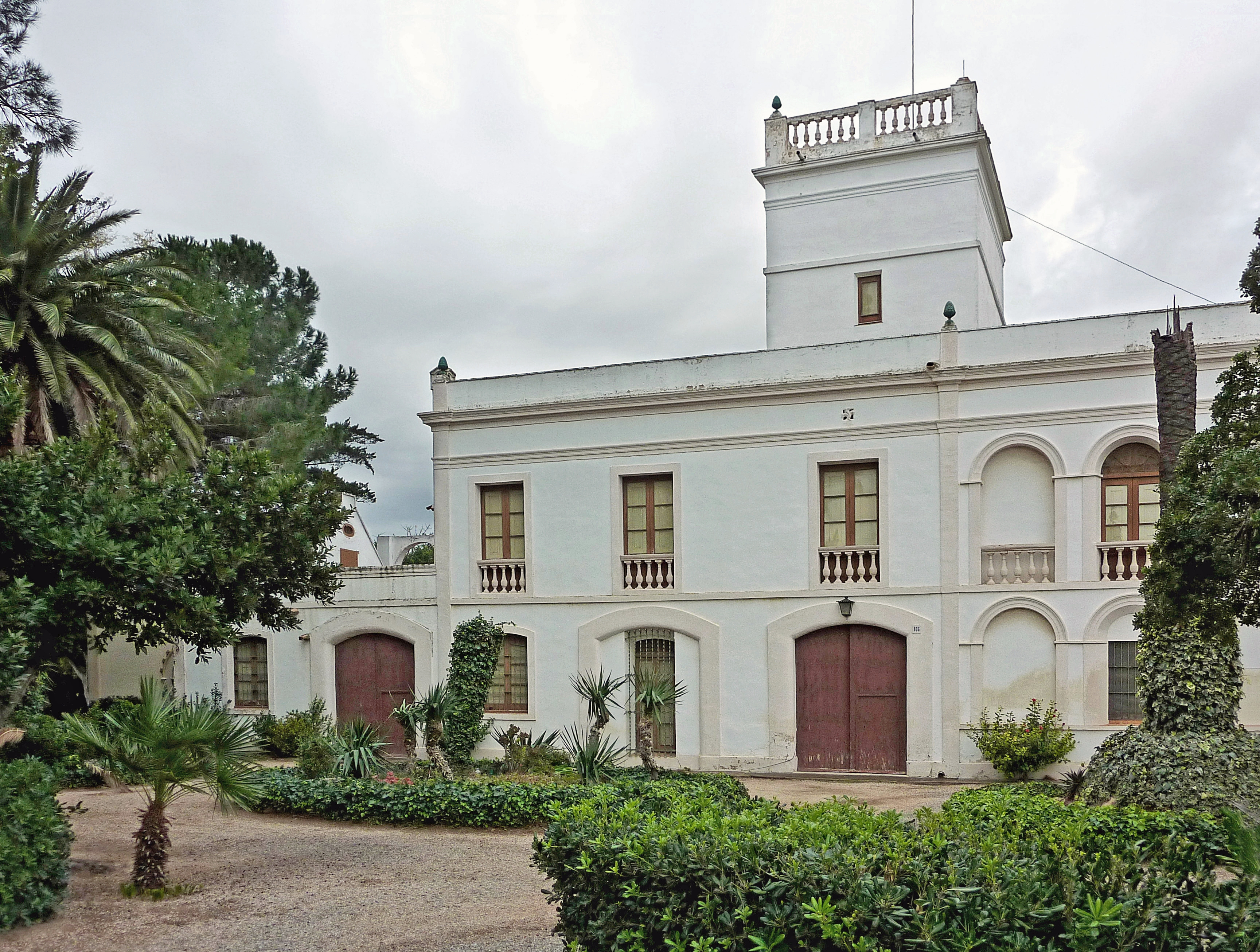 Mas Miró